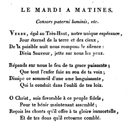 Jean Racine, französische Nachdichtung des lateinischen Hymnus Consors paterni luminis